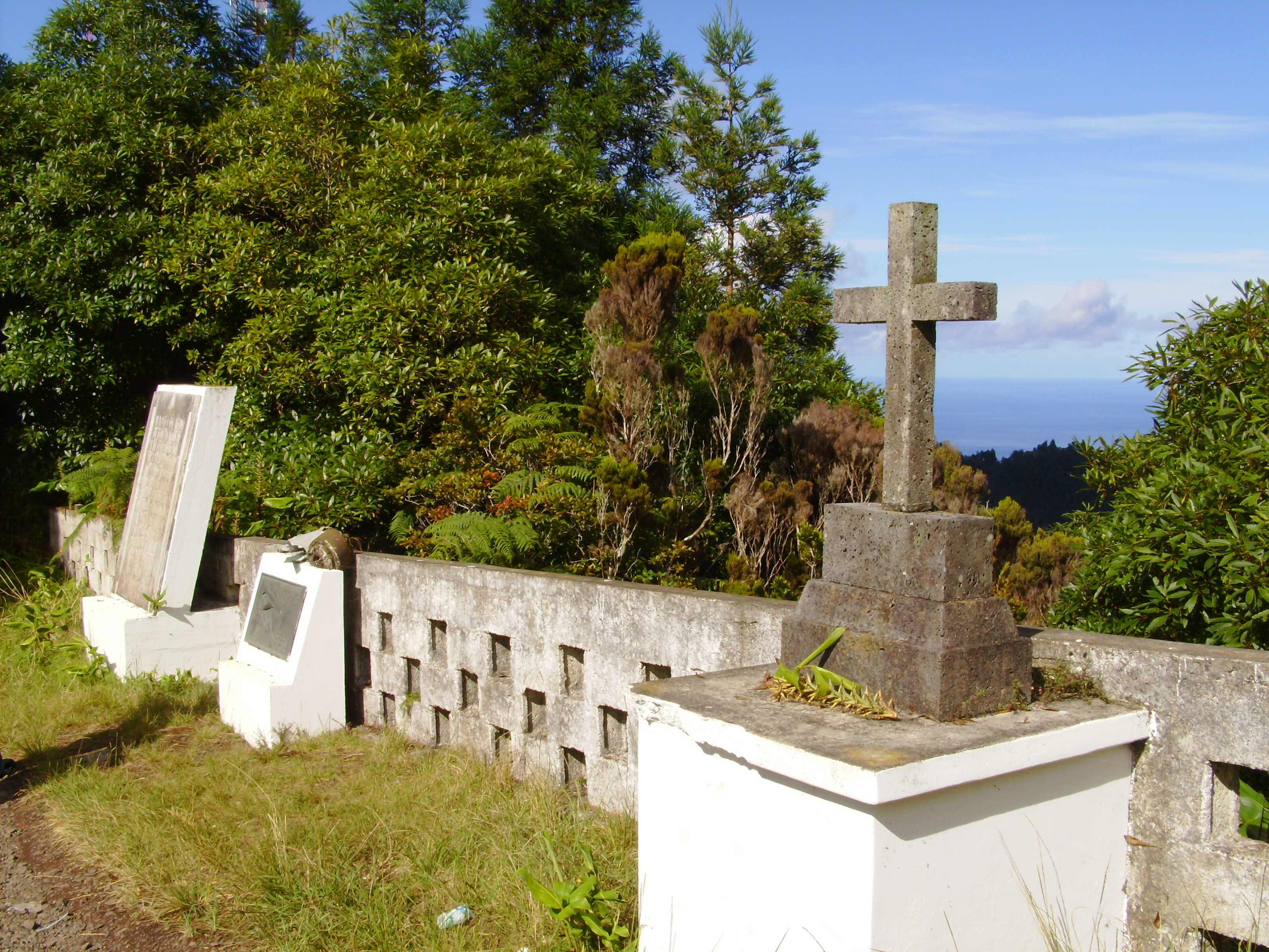 Pico Alto, concelho de Vila do Porto, ilha de Santa Maria, Açores: monumento aos mortos do vôo 1851.